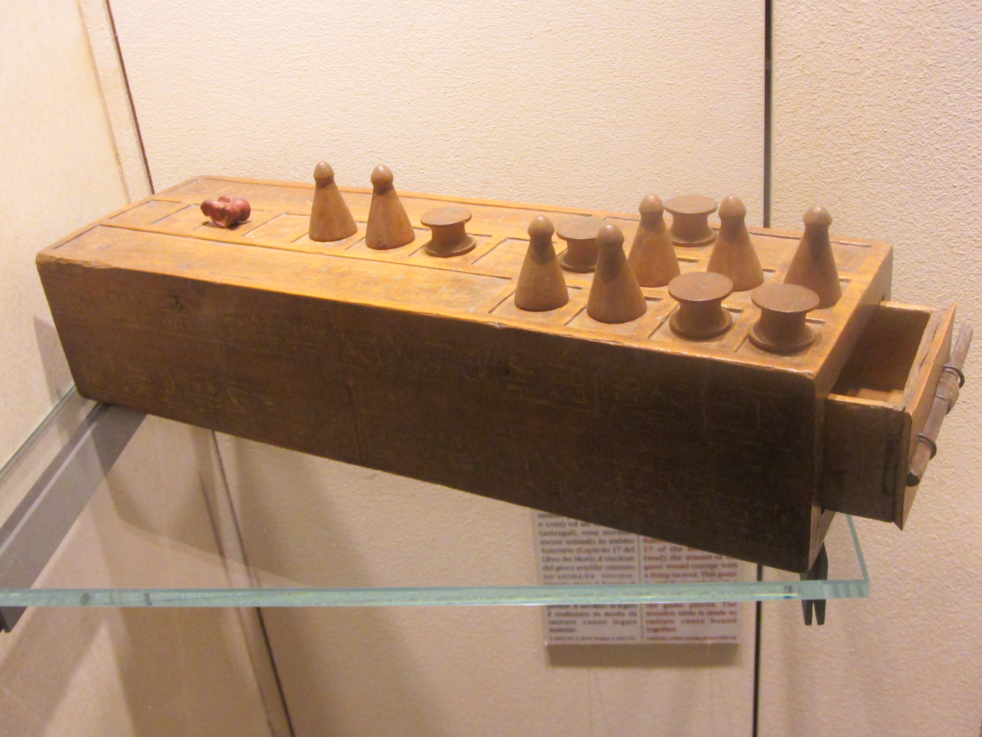 antico Senet (gioco da tavolo molto diffuso in antico egitto) in legno esposto al museo egizio di torino ( 3 parte del museo )